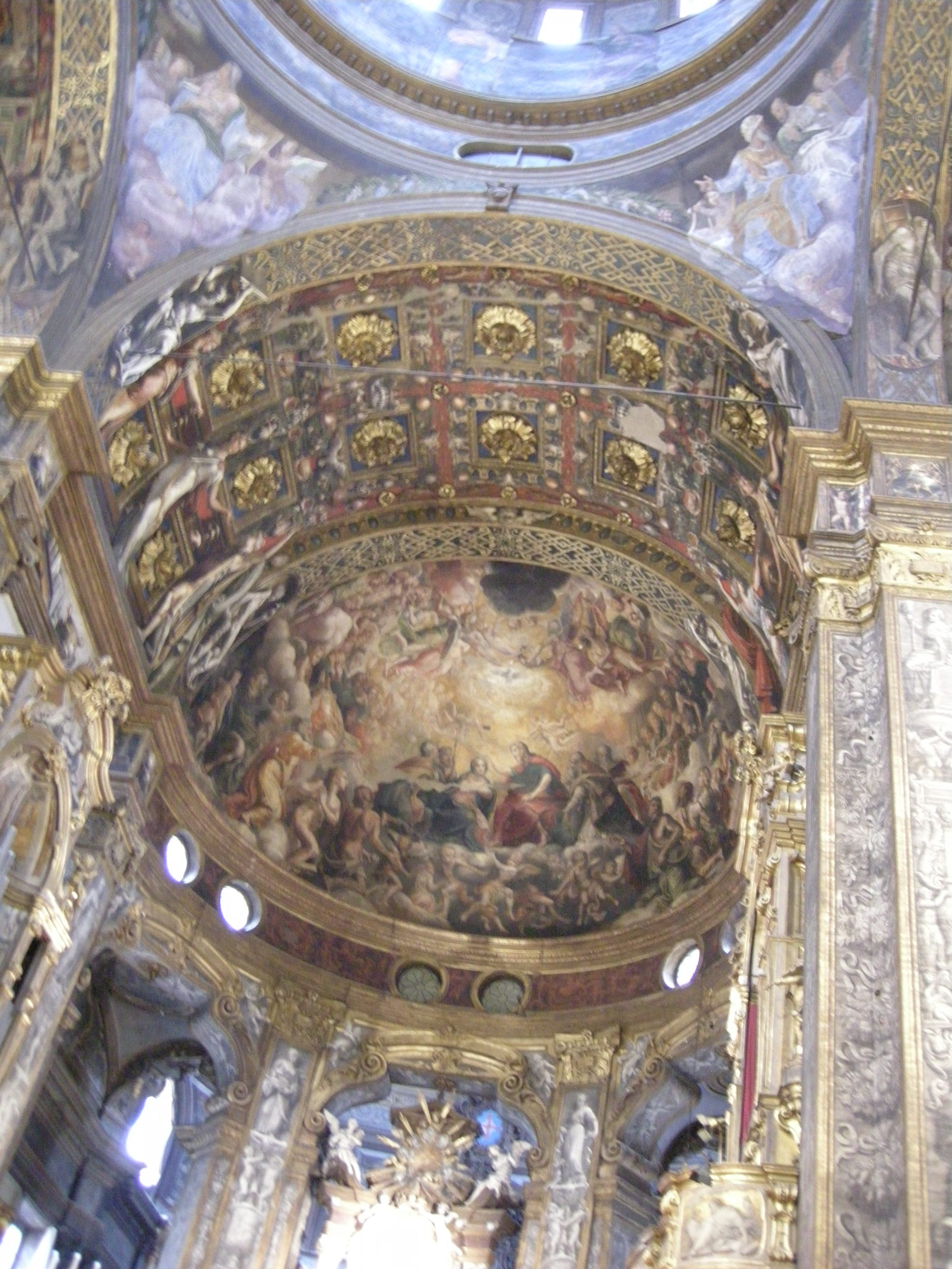 Santa maria della steccata, volta